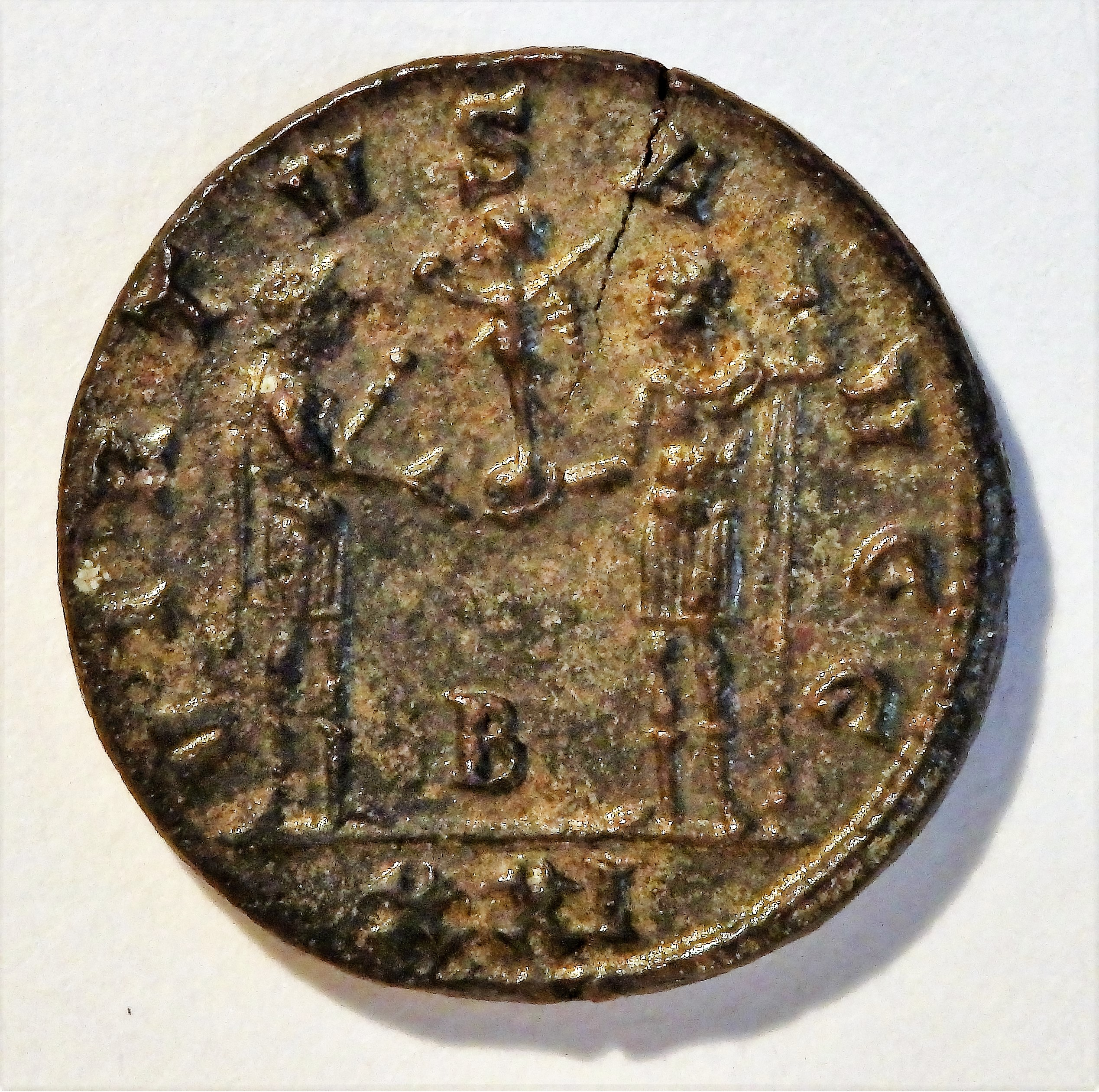 Rückseite der Münze, Carinus erhält Globus, darüber Victoria, von Carus, Umschrift: VIRTVS AVGG